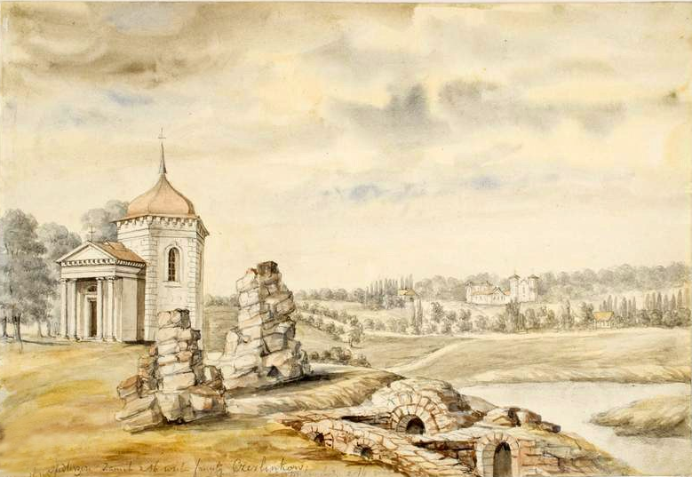 Siedliszcze. Ruiny zamku Czerlenkowskich i kaplica